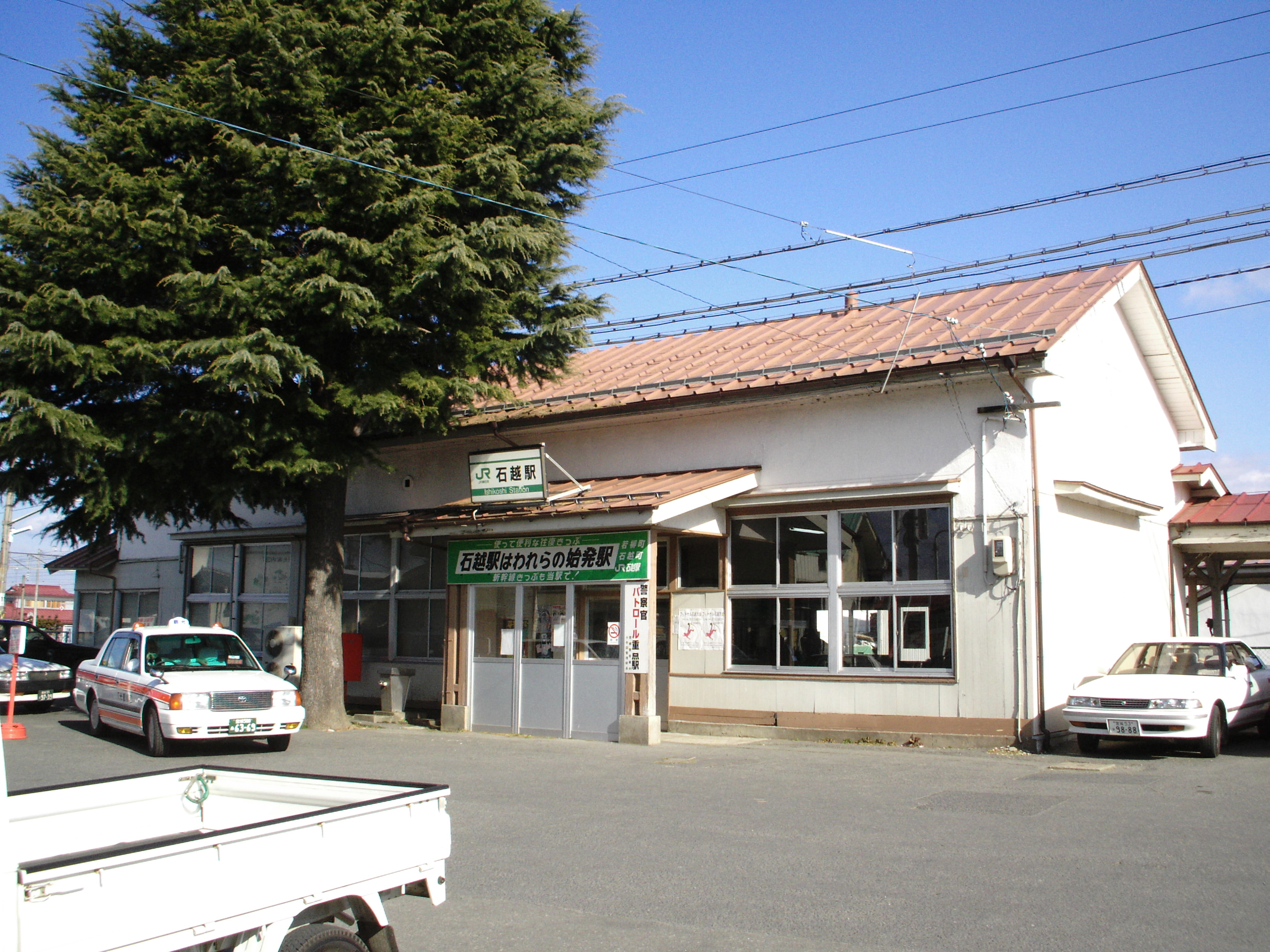 東日本旅客鉄道（JR東日本）東北本線石越駅